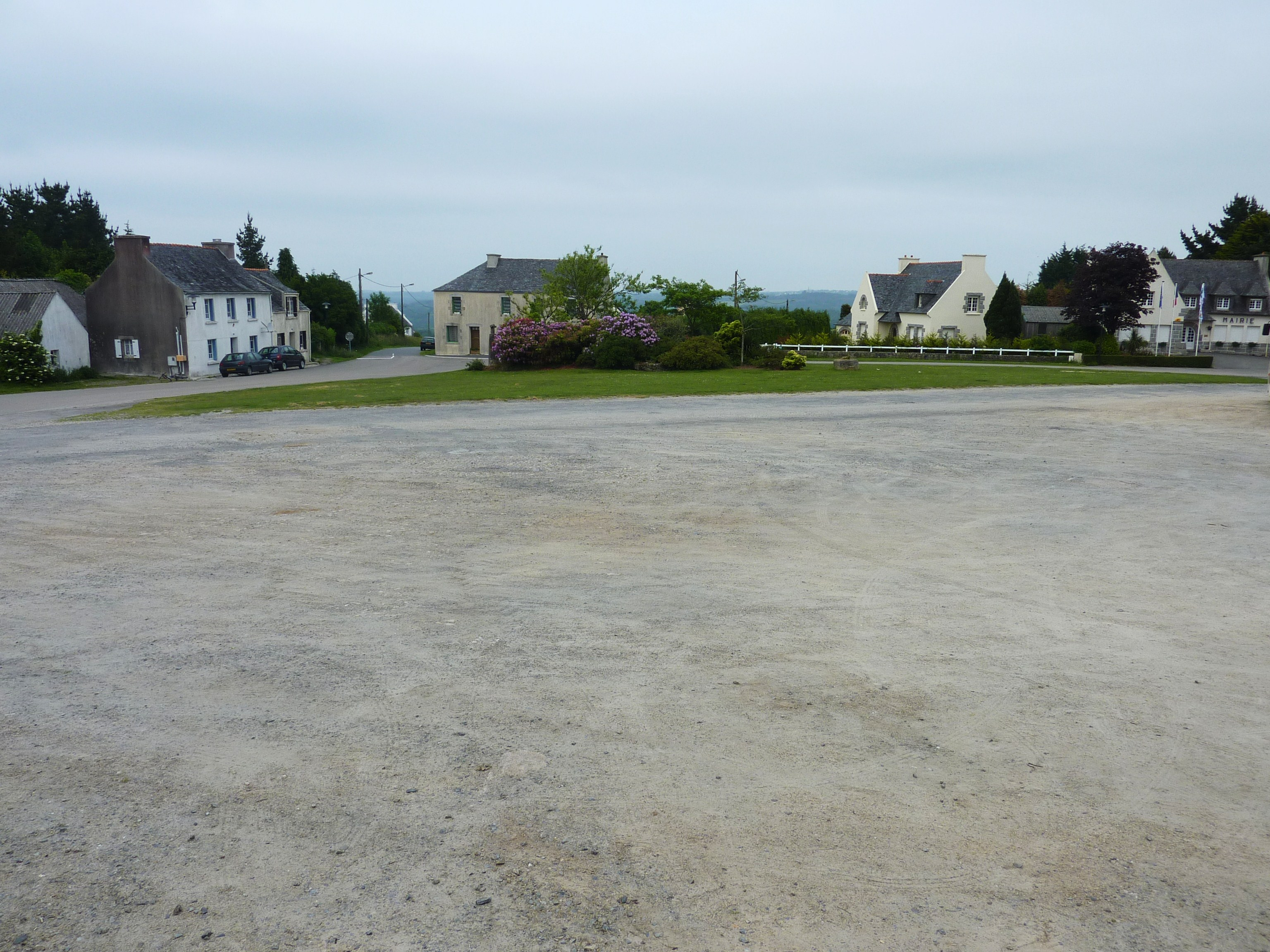 Commana La place du champ de foire vue depuis l'église